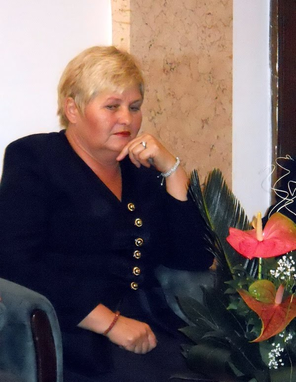 Marija Tanackov u kikindskoj biblioteci, na promociji svoje knjige OBLIKOVANJE TRADICIJE.